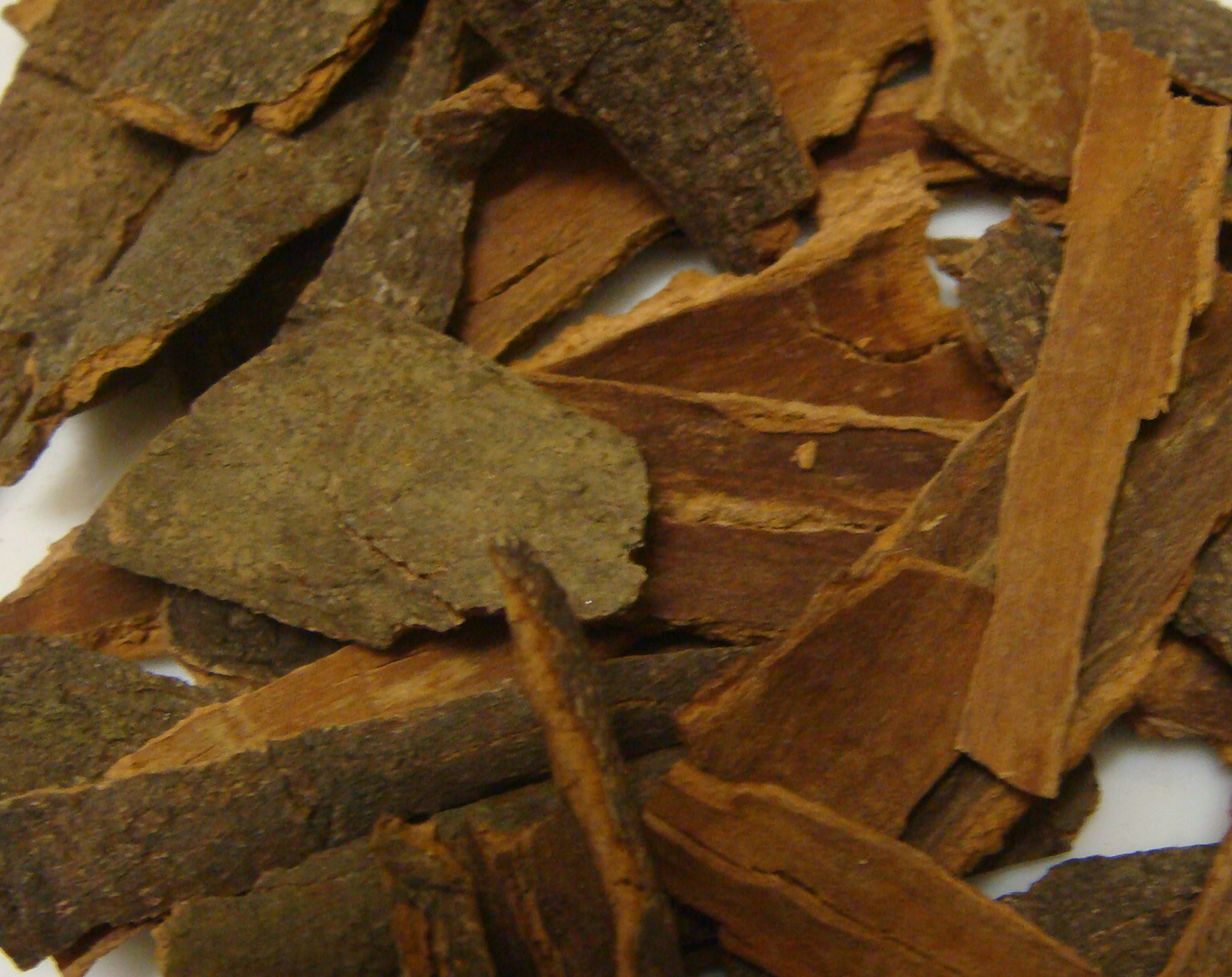 പട്ട എന്നറിയപ്പെടുന്ന കറുവപ്പട്ട.